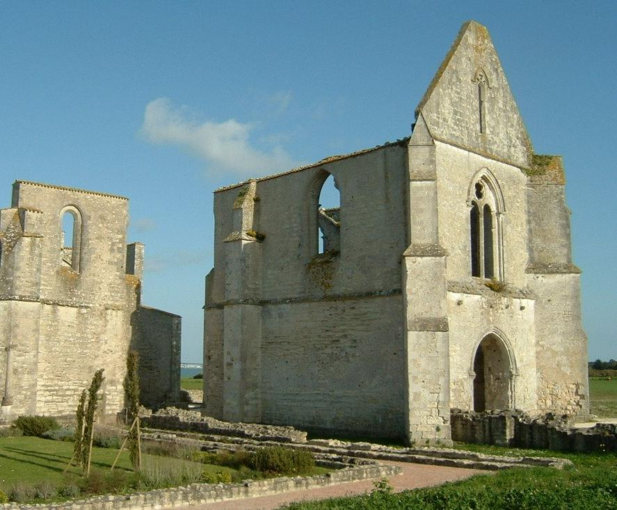 Abbaye Notre Dame de Ré dite des Châteliers : vue d'ensemble du nord, avec en premier plan les restes du cloître (La Flotte, Ile de Ré, Charente Maritime, France)